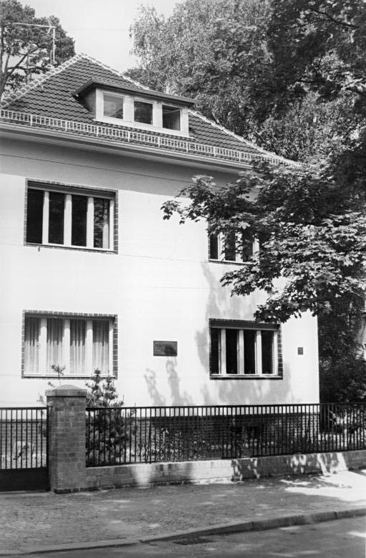 Berlin, Ernst-Busch-Haus ADN-ZB Reiche 21.5.1981 Berlin: Das Haus des revolutionären Künstlers Ernst Busch in Berlin-Pankow wurde am 21.5.1981 als Gedenk- und Lehrstätte der Öffentlichkeit übergeben.